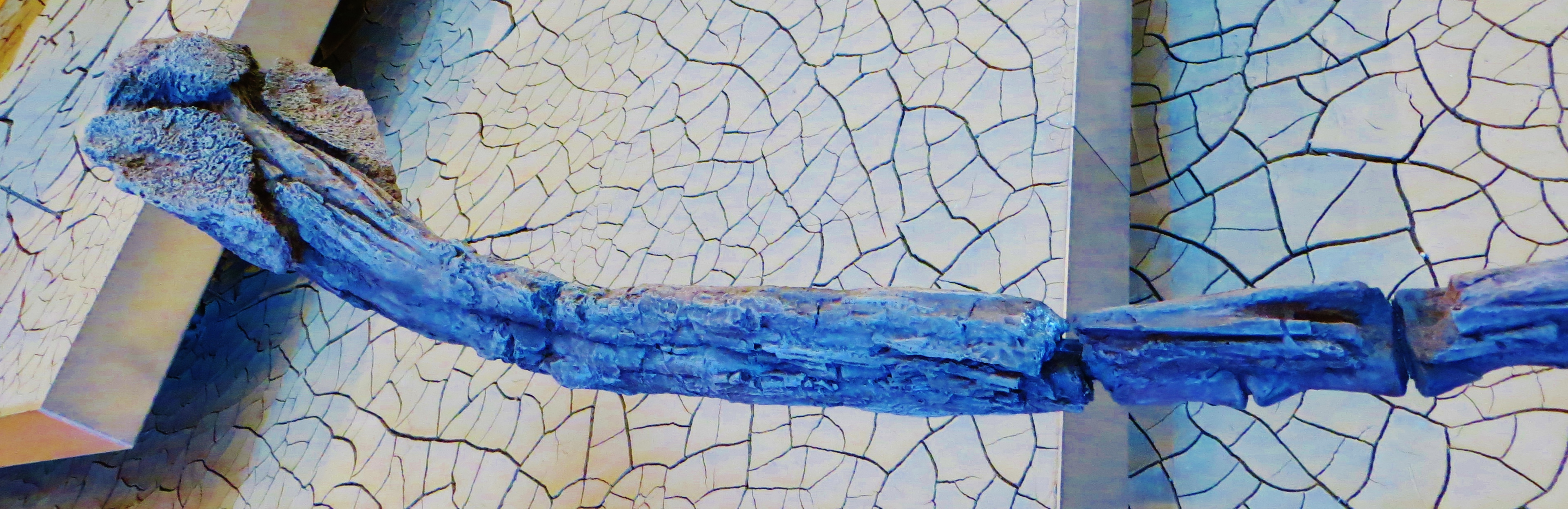 Fossil of Talarurus, an extinct reptile- Took the picture at Muse (Trento)